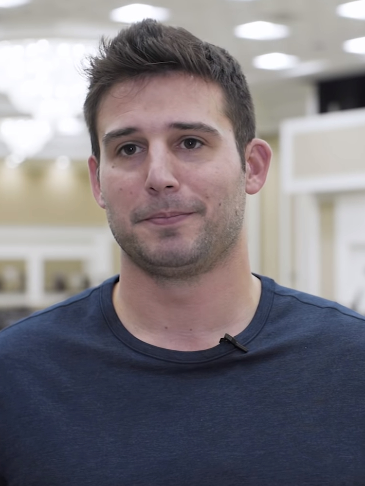 Darren Elias vor dem Finaltisch des WPT LA Poker Classic